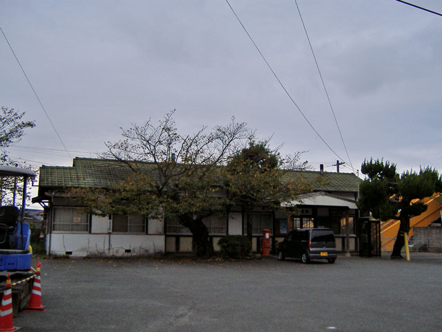 2007年10月 投稿者撮影